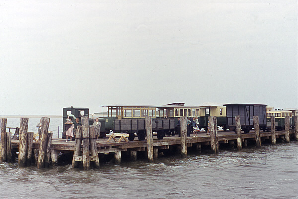 Alter Anleger Spiekeroog (1949–1969) aufgenommen 1955